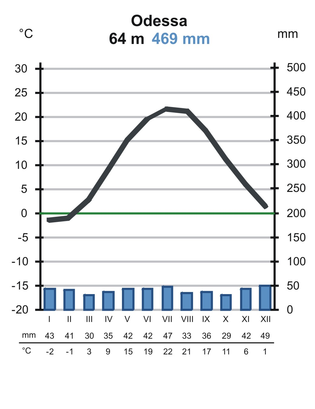 Odessa kliimadiagramm.